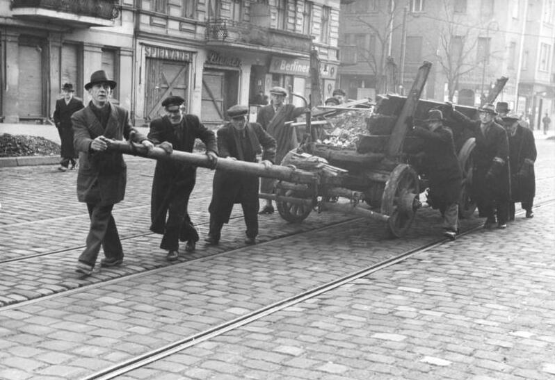 Berlin, Bau von Straßensperren ADN-ZB/Archiv Das faschistische Deutschland im II. Weltkrieg 1939-45 Berlin wird am 1. Februar 1945 zum "Verteidigungsbereich" erklärt. Volkssturmsoldaten transportieren am 10. März aus zerbombten Häusern Material heran für den Bau einer Panzersperre am S-Bahnhof Hermannstraße in Neukölln. 343-45